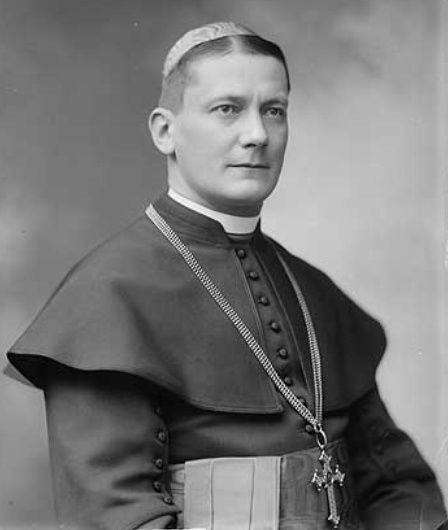 Lev kardinál Skrbenský